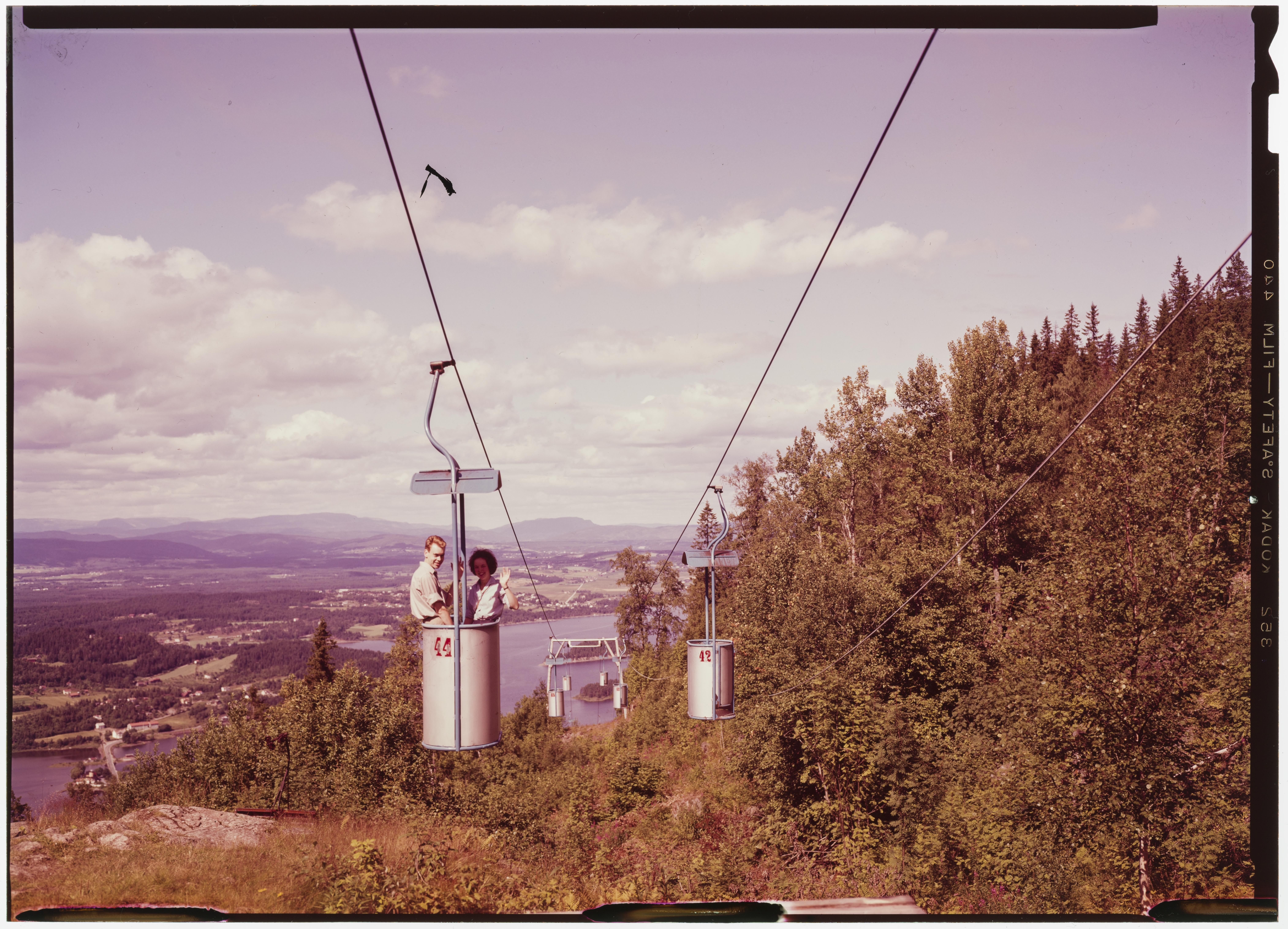 Bildet er hentet fra Nasjonalbibliotekets bildesamling. Anmerkninger til bildet var: Tittel er hentet fra emballasje. Krokkleiva,Tyrifjorden,Steinsfjorden, Hole, Buskerud Buskerud